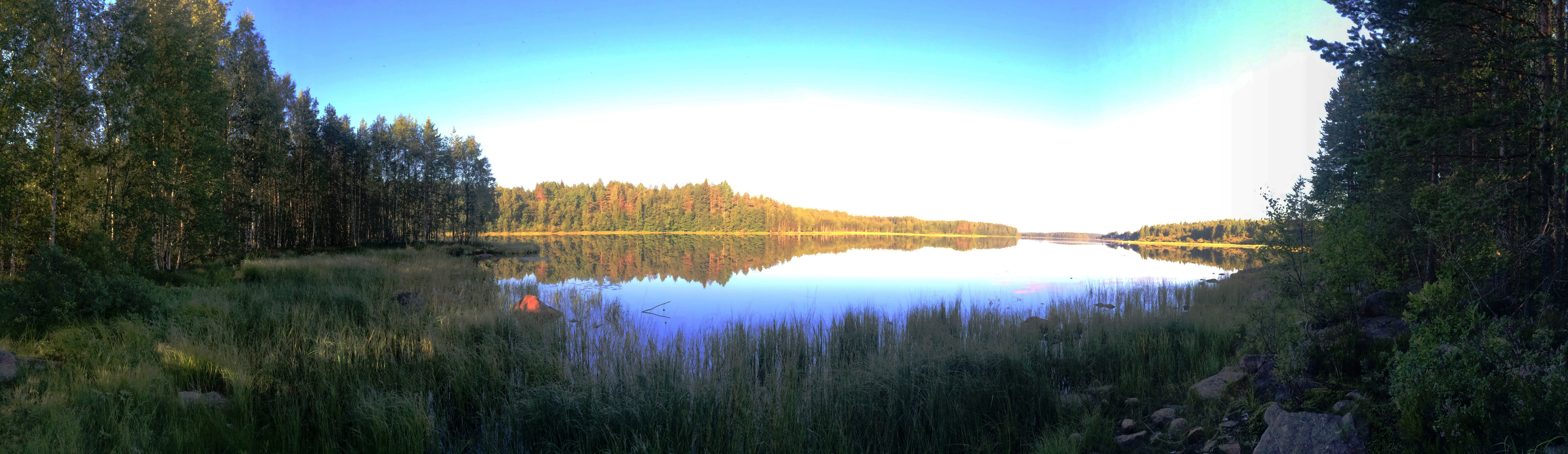 Кайтаярви (озеро, Суоярвский район)